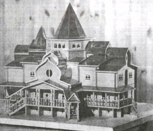 Макет дома из клееного бруса, созданный конструкторами и инженерами Сокольского ДОКа по проекту вологодских архитекторов в 1999 году. Проект впоследствии был реализован на комбинате. Дом установлен в Великом Устюгеи является резиденцией Деда Мороза. Макет хранится в музее Сокольского ДОКа.